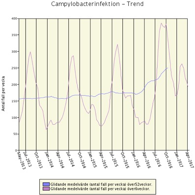 diagram trender campylobacterinfektion